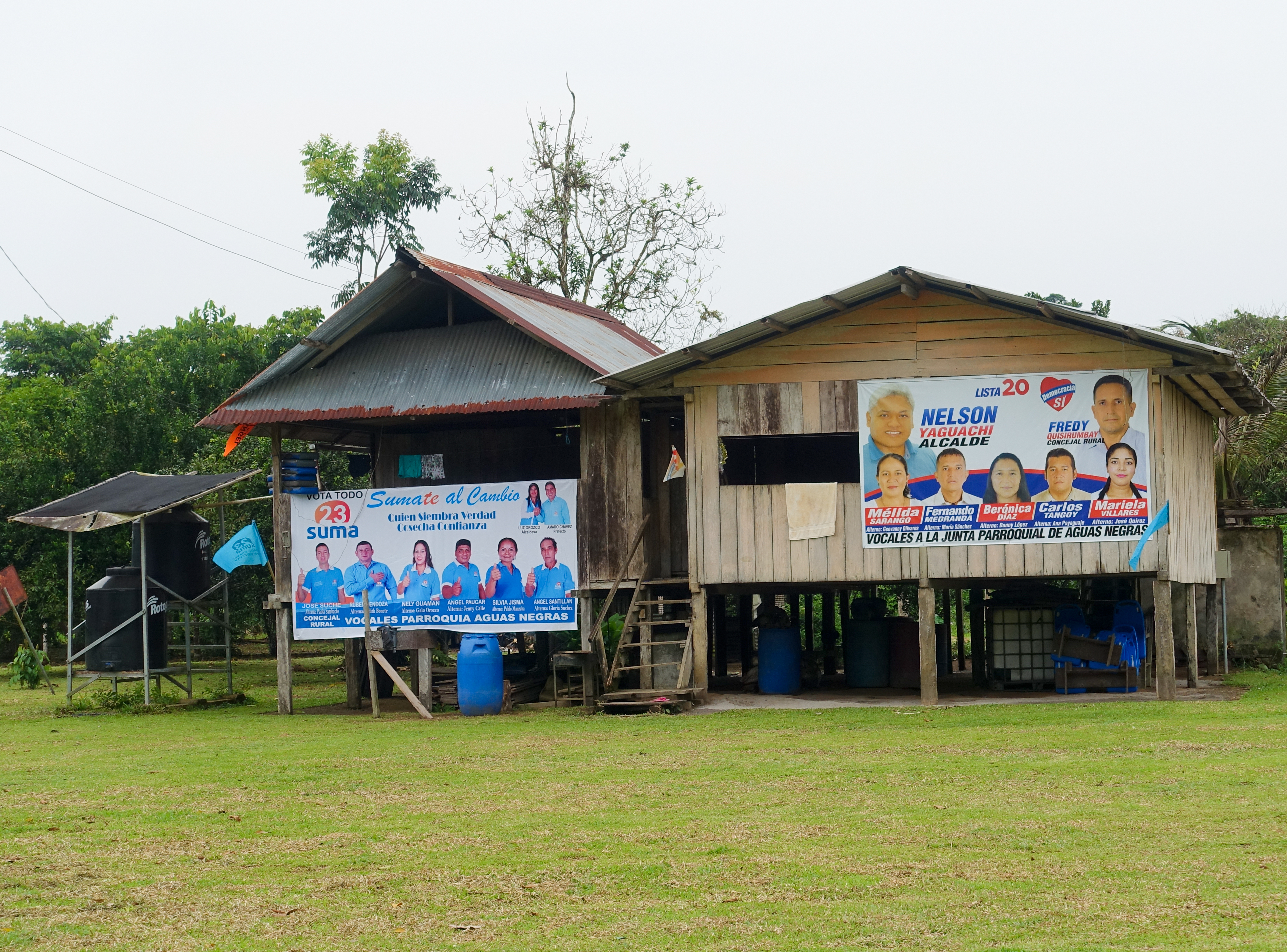 Bolzplatz und Versammlungshaus in der Siona-Siedlung San Victoriano am Río Cuyabeno südlich der Laguna Grande. Die Siedlung ist nur per Boot zu erreichen. Die nächste Straße ist etwa 3 Stunden Motorbootfahrt entfernt.